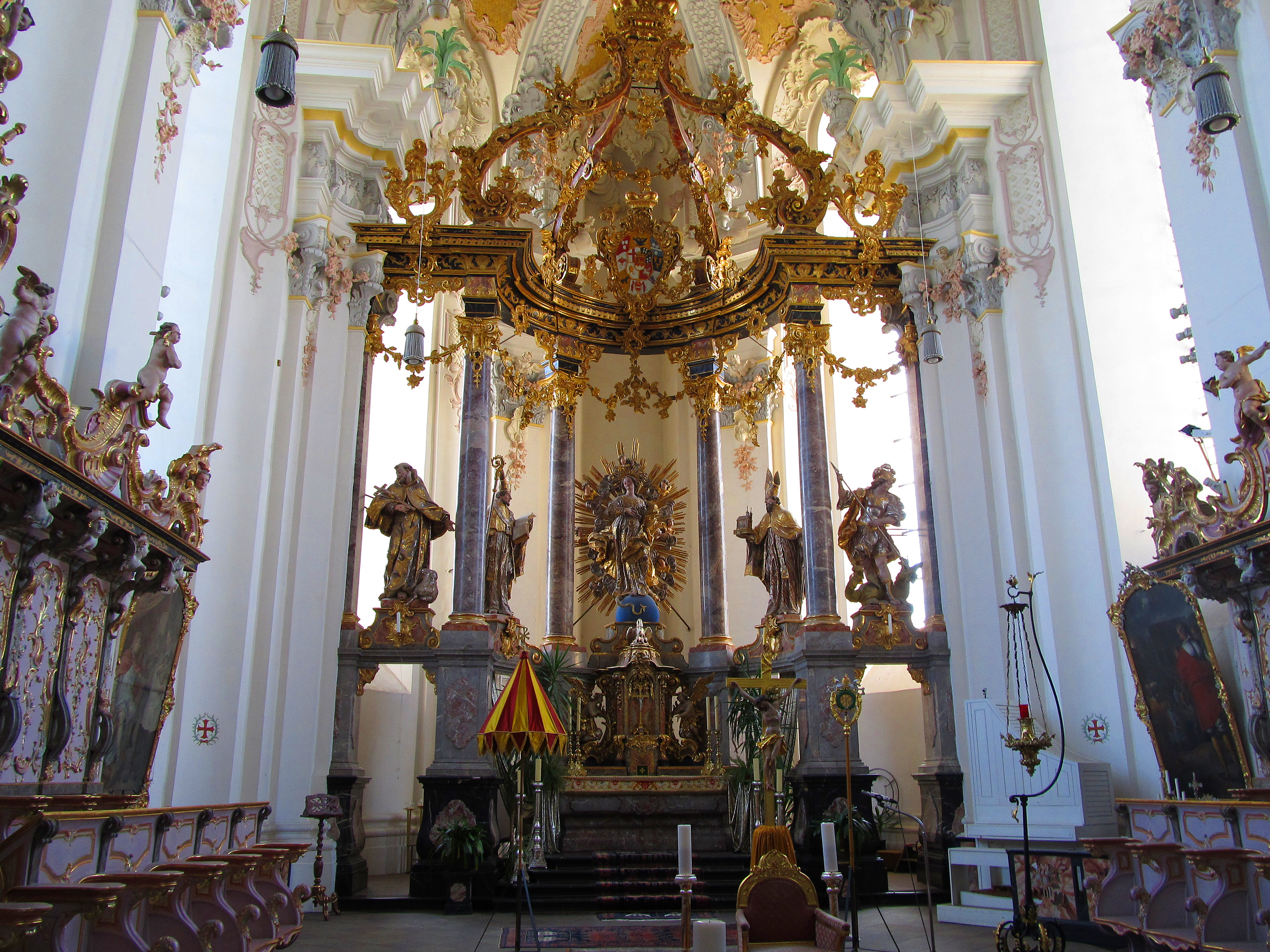 Chorraum der katholischen Pfarrkirche St. Paulin in Trier, Rheinland-Pfalz